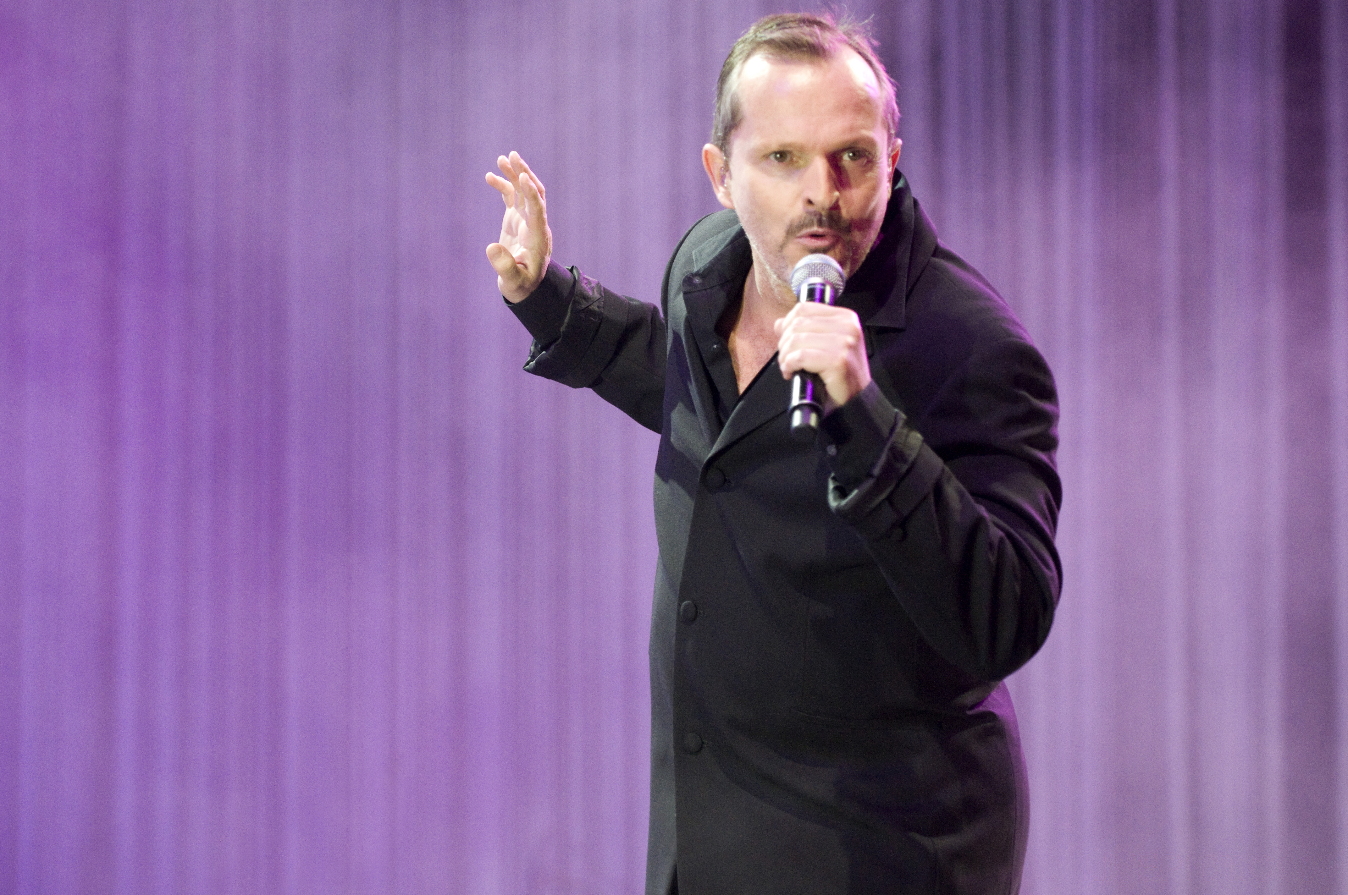 Miguel Bosé